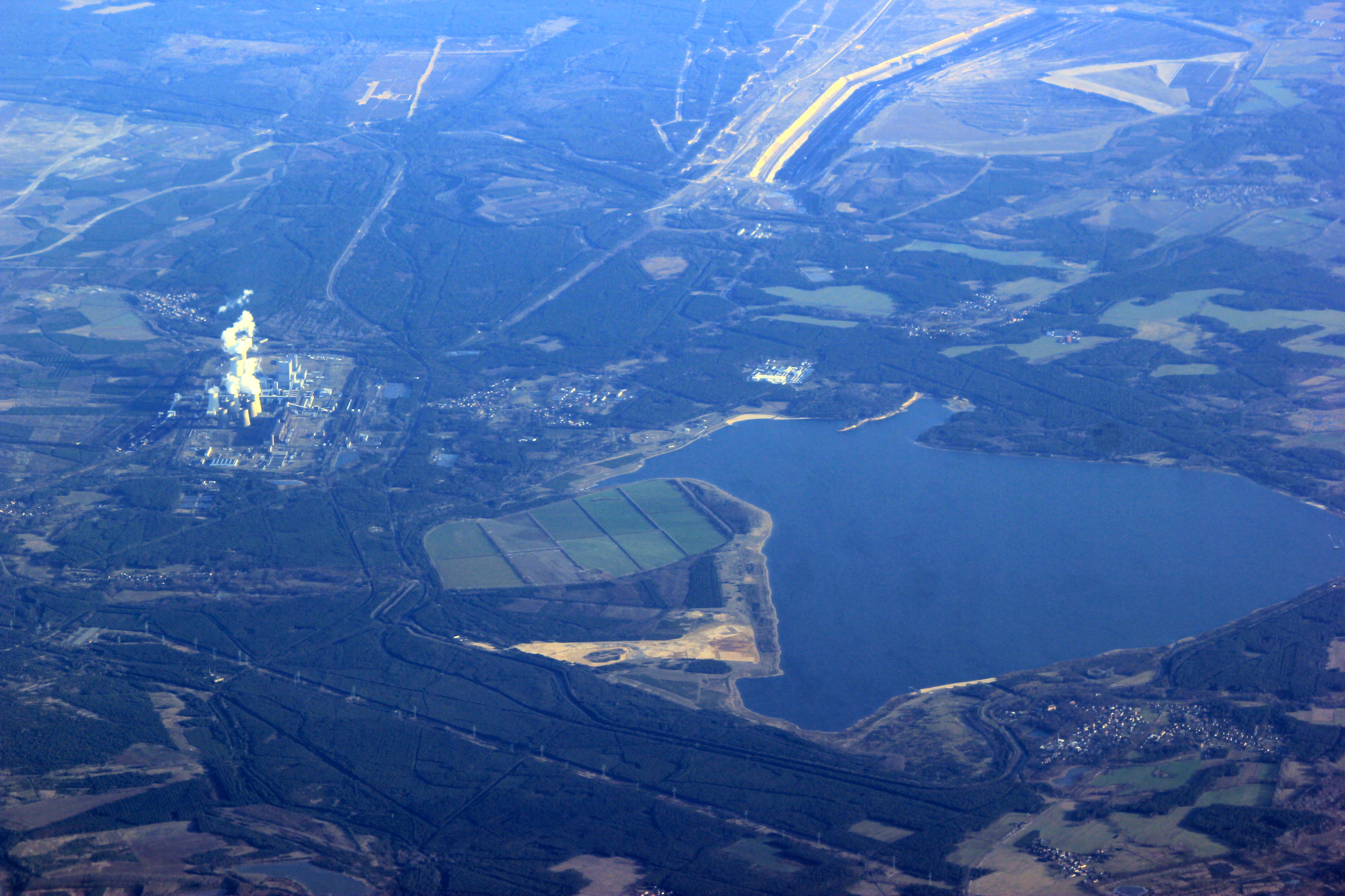 Hornjoserbsce: Bjerwałdski jězor, Hamorska milinarnja a Rychwałdska brunicowa jama.